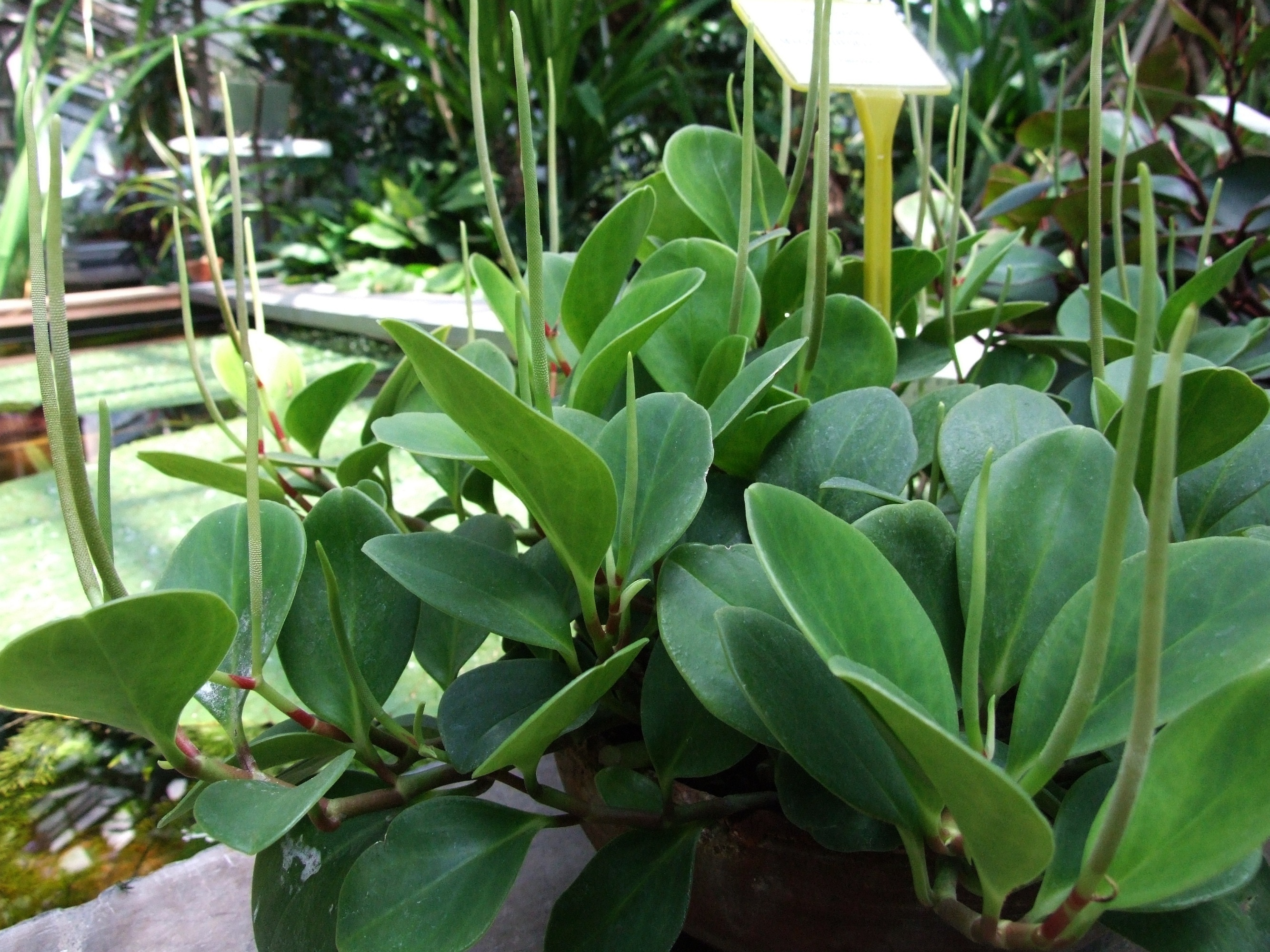 Peperomia magnoliifolia